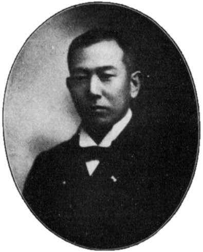 田村律之助（1867～1932）